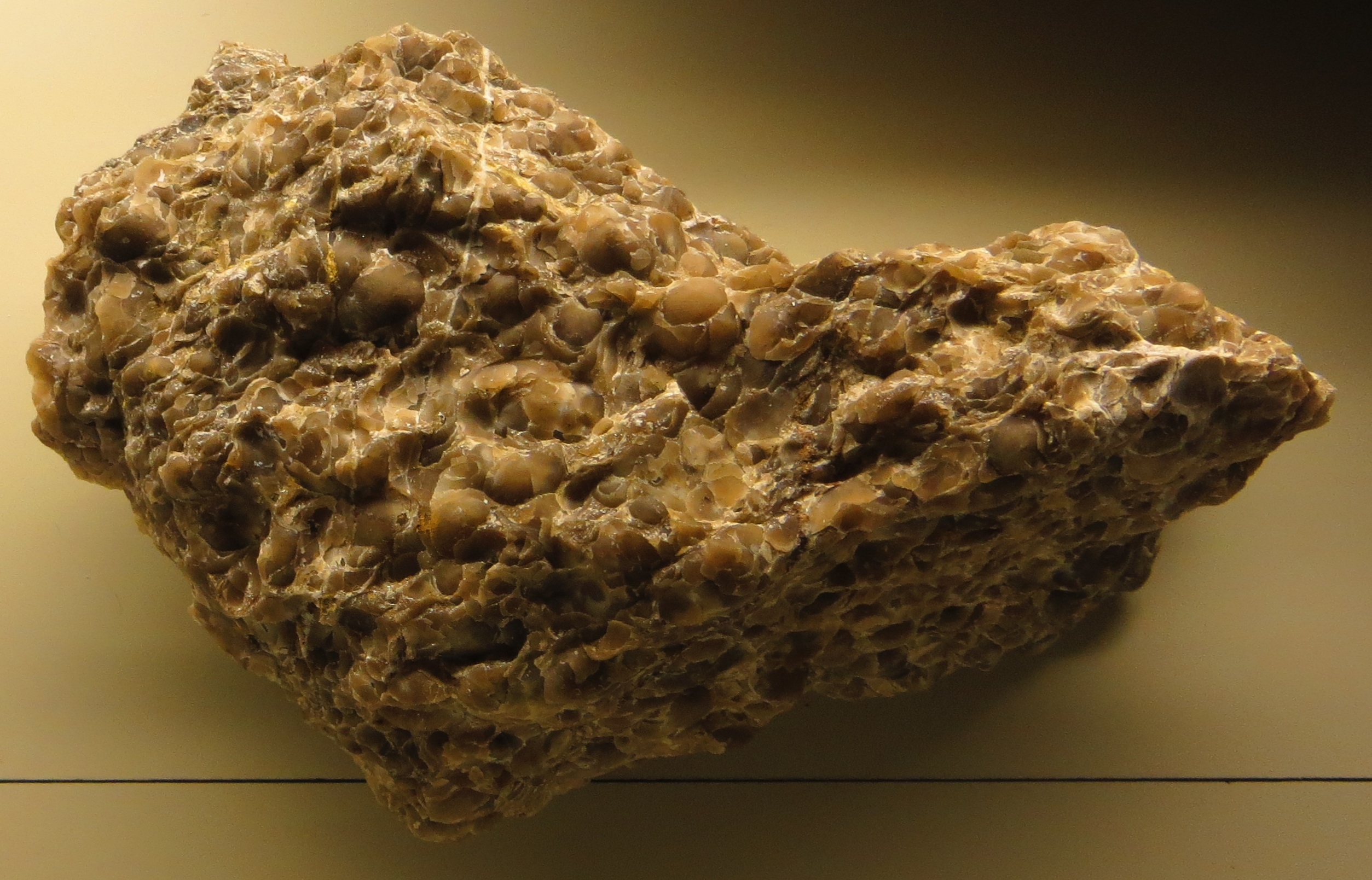 Took the picture at Jura-Museum, Eichstaett